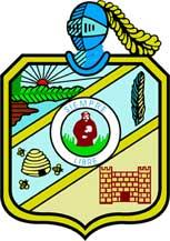 Escudo de armas oficial de San Francisco del Rincón, Guanajuato